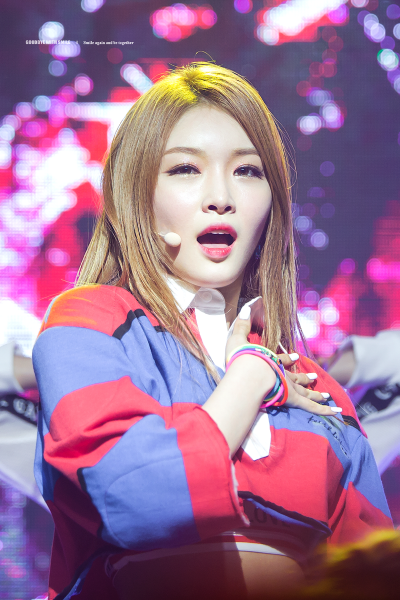 170607 김청하 데뷔 쇼케이스 12 pic (5)